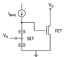 SET-FET cicuit